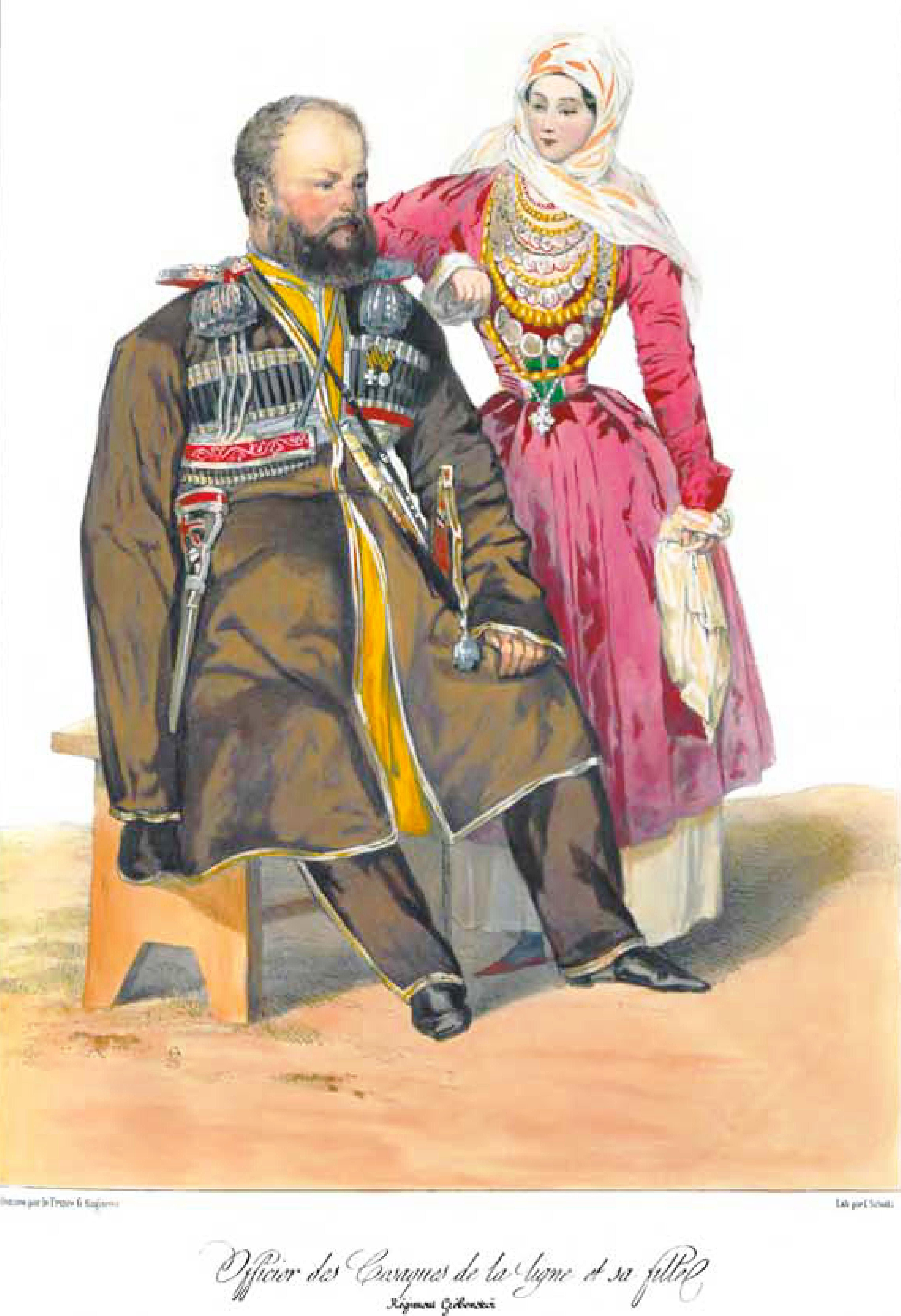 Scènes, paysages, moeurs et costumes du Caucase dessinés d'aprés nature par le prince G. Gagarine.